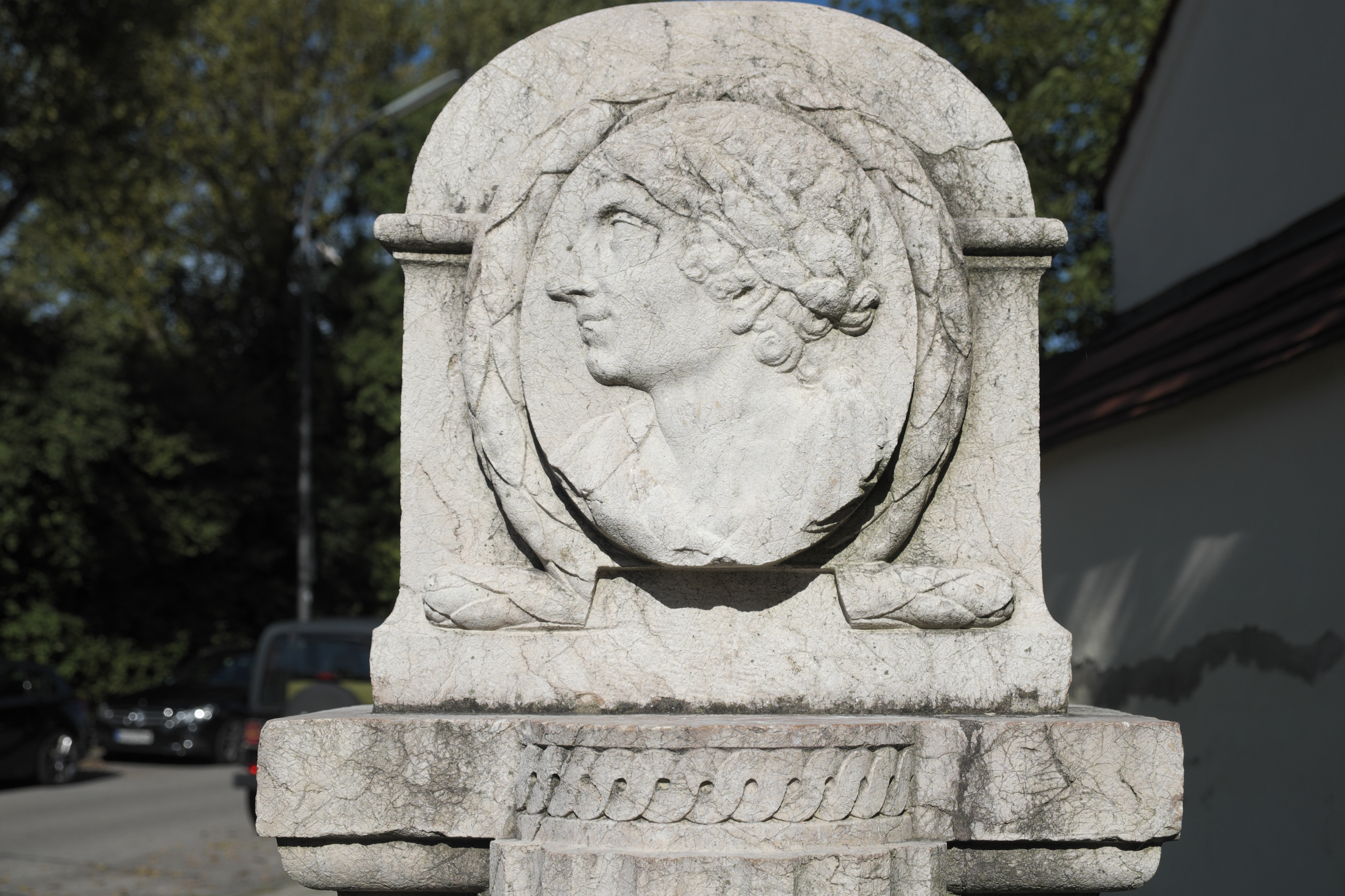 Kennedy-Brünnlein vor der katholischen Pfarrkirche St. Maria in Ramersdorf im Stadtbezirk Ramersdorf-Perlach in München (Bayern/Deutschland)